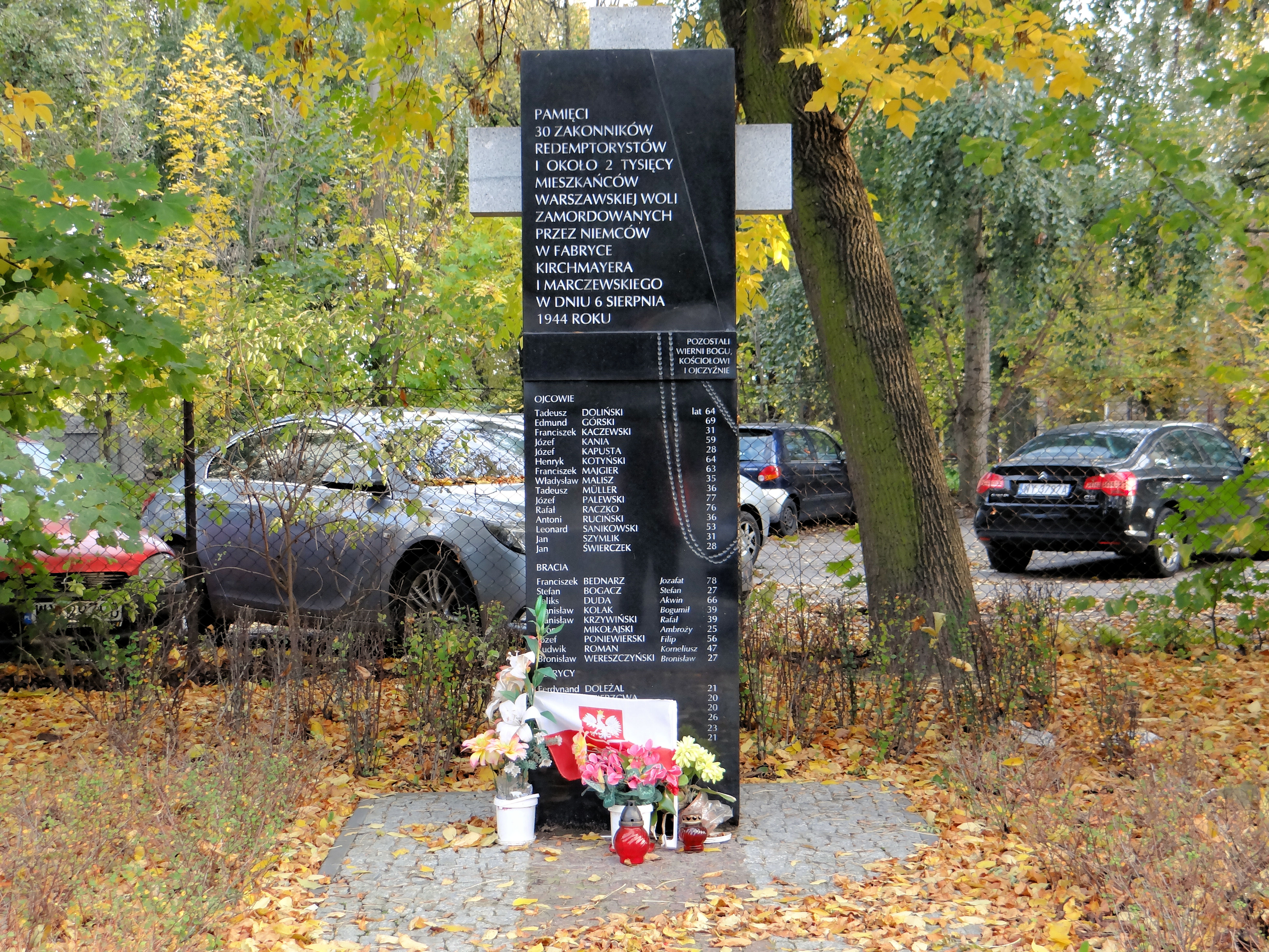 Miejsce poświęcone pamięci 30 zakonników - redemptorystów i około 2000 mieszkańców Woli zamordowanych na terenie byłej fabryki Kirchmayera i Marczewskiego